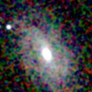 Galaxy NGC 10